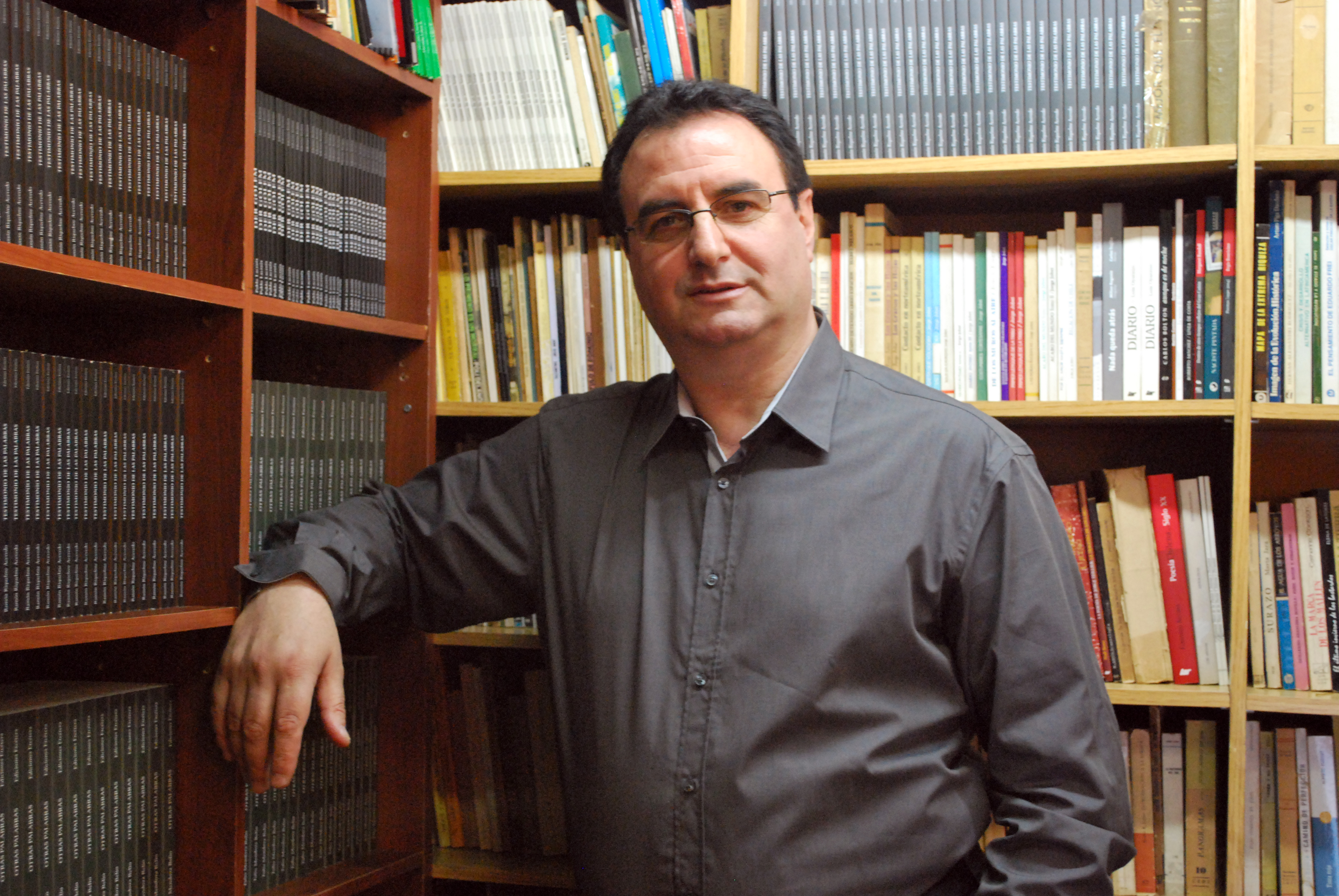 Foto realizada por Carla León para la difusión de la Ceremonia de entrega de Premios Regionales de Arte y Cultura, Región del Bío-Bío, CHILE. El poeta Tulio Mendoza Belio obtuvo el Premio Regional Baldomero Lillo de Artes Literarias (Casa del Arte de la Universidad de Concepción, Chile, Martes 6 Diciembre 2011).